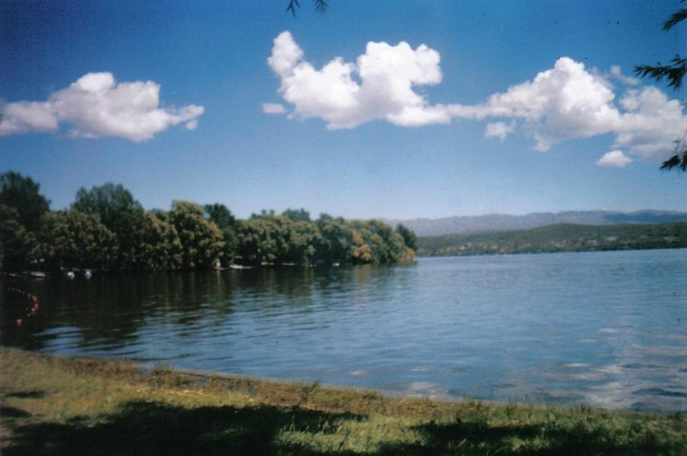 Fotografía del Dique La Florida, San Luis, Argentina